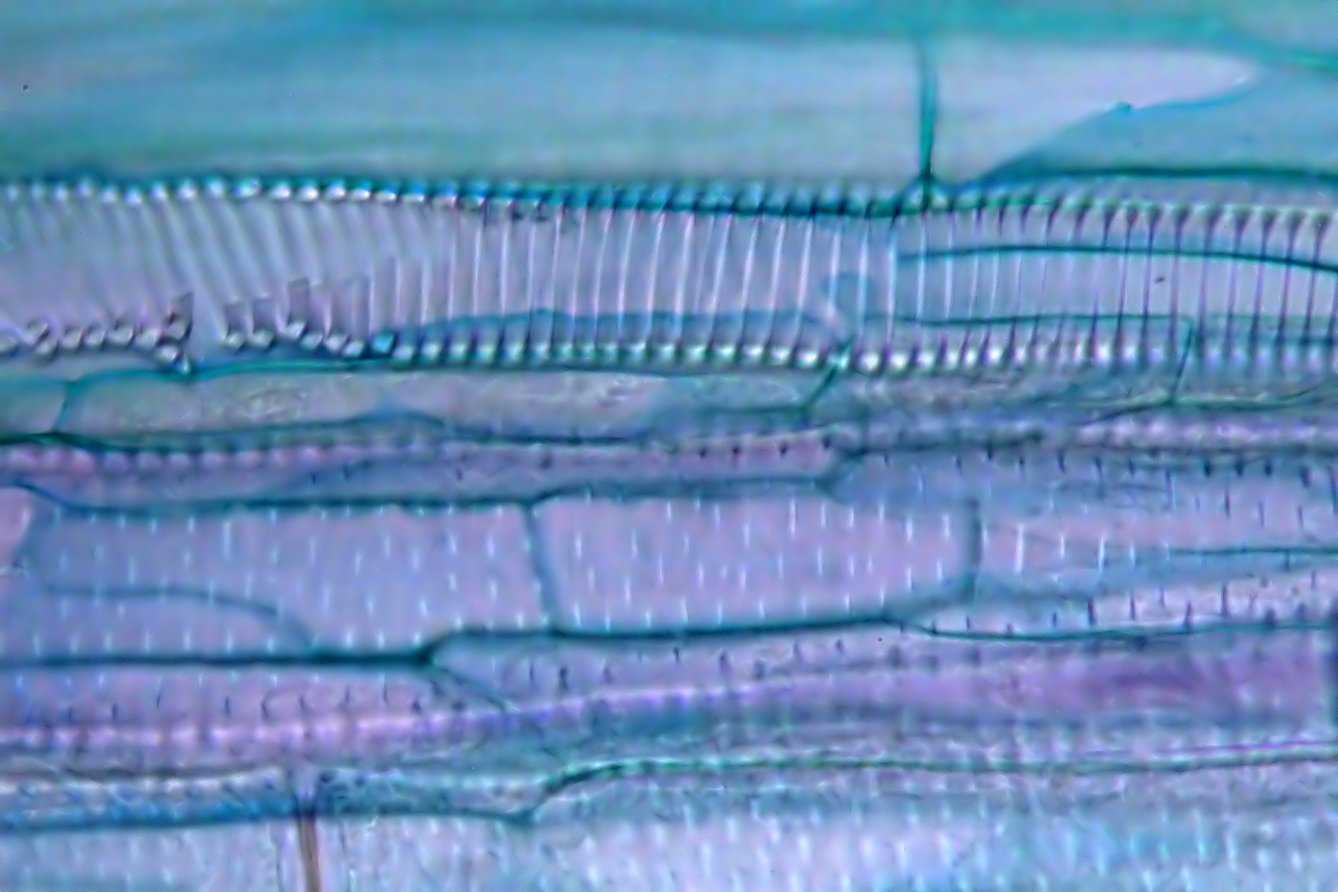 Alliaria petiolata